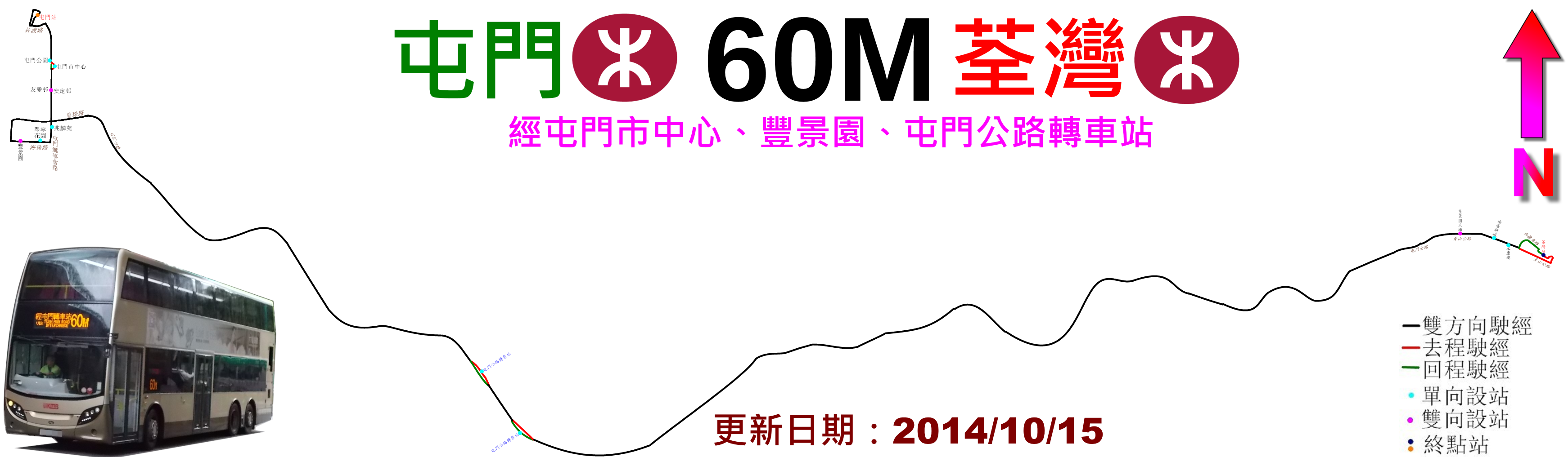 中文（香港）: 九巴60M線的走線圖